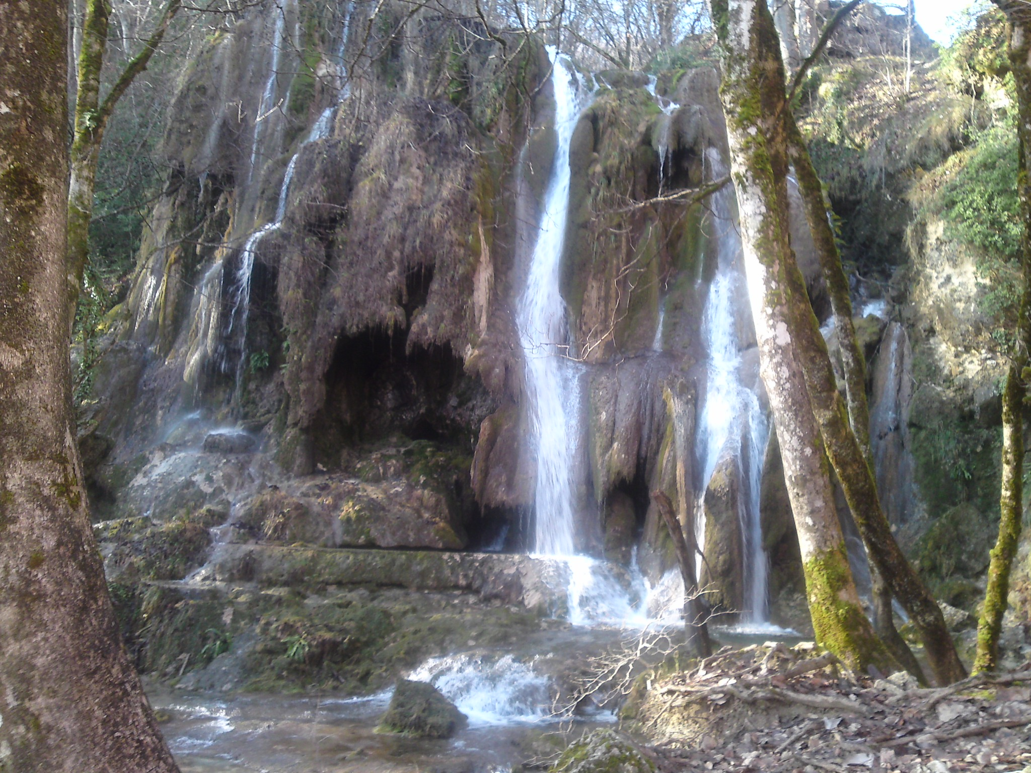 cascade de Clairefontaine sur l'Arène à Virieu-le-Grand